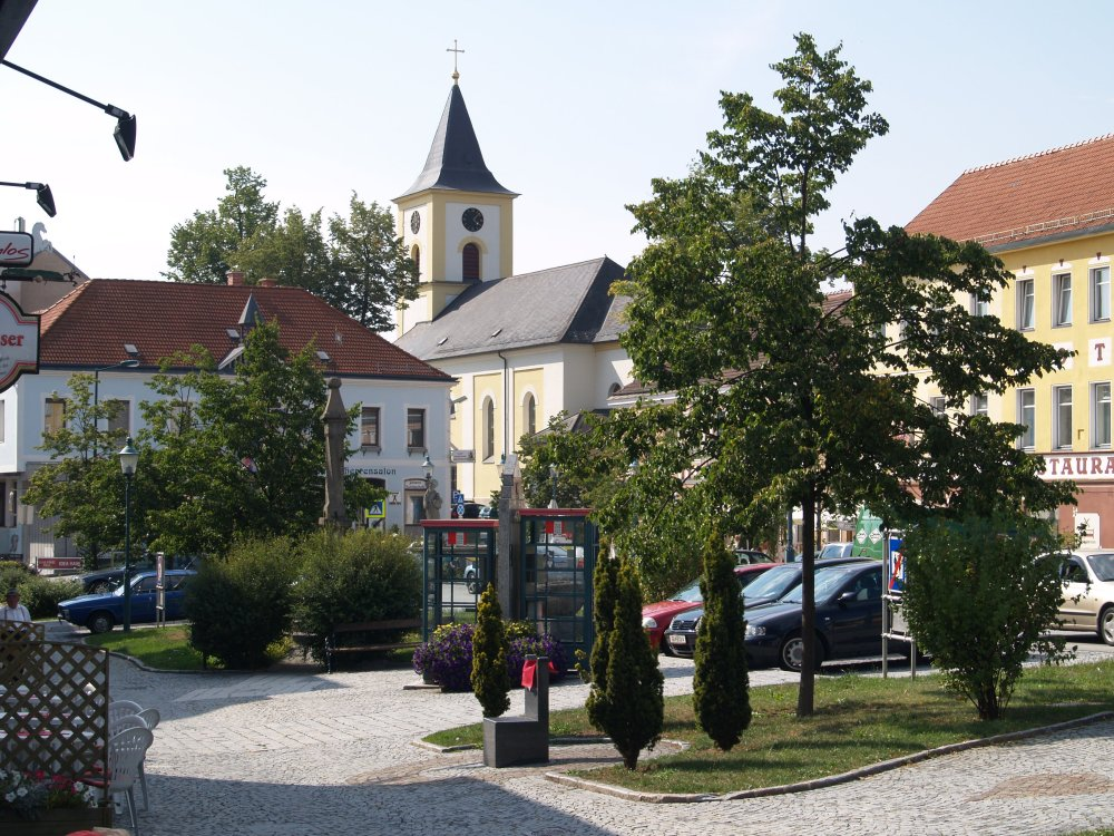 Blick vom Stadtplatz in Schrems zur Kirche.